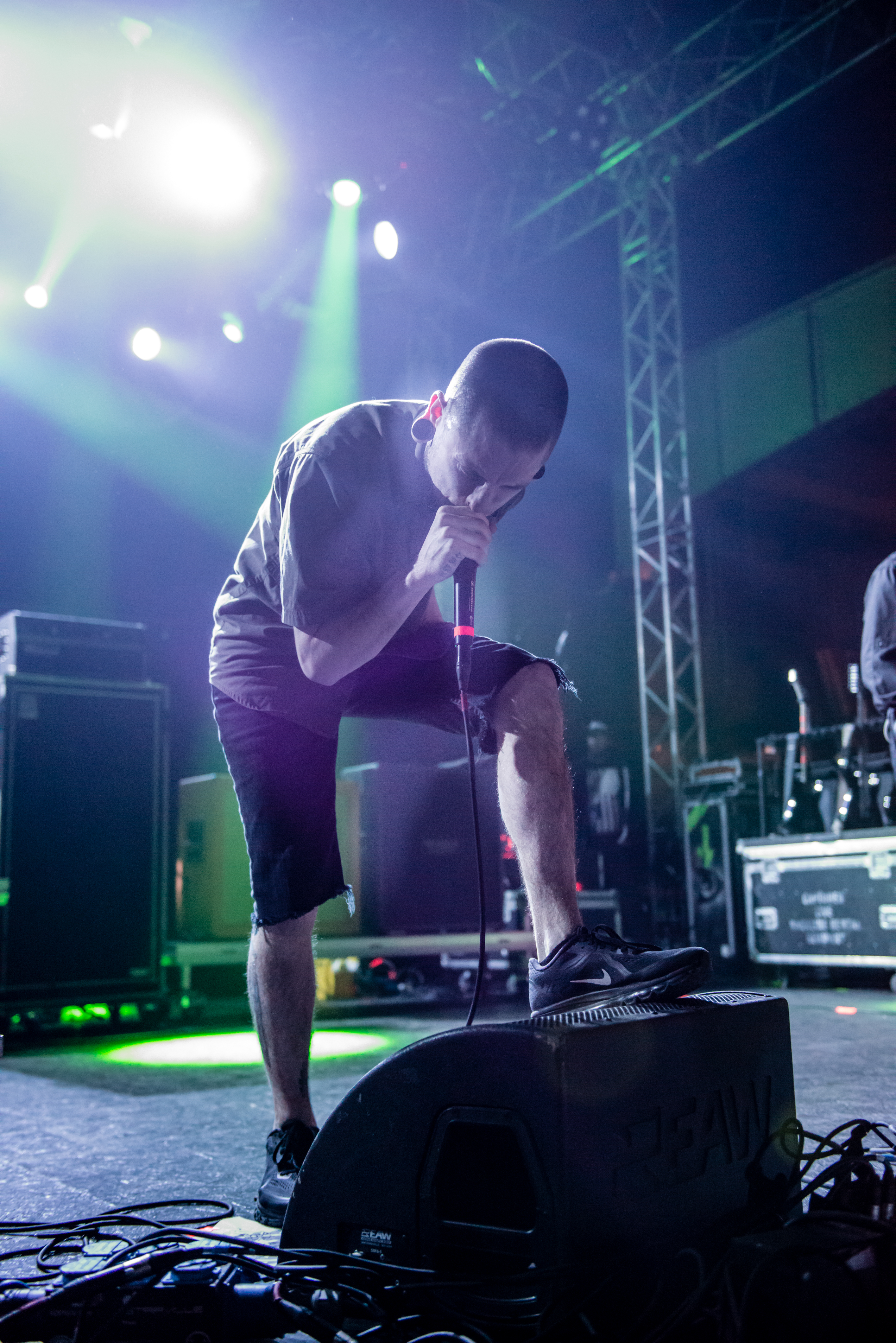 'Impericon Festival 2015; Oberhausen Turbinenhalle': 'Whitechapel'